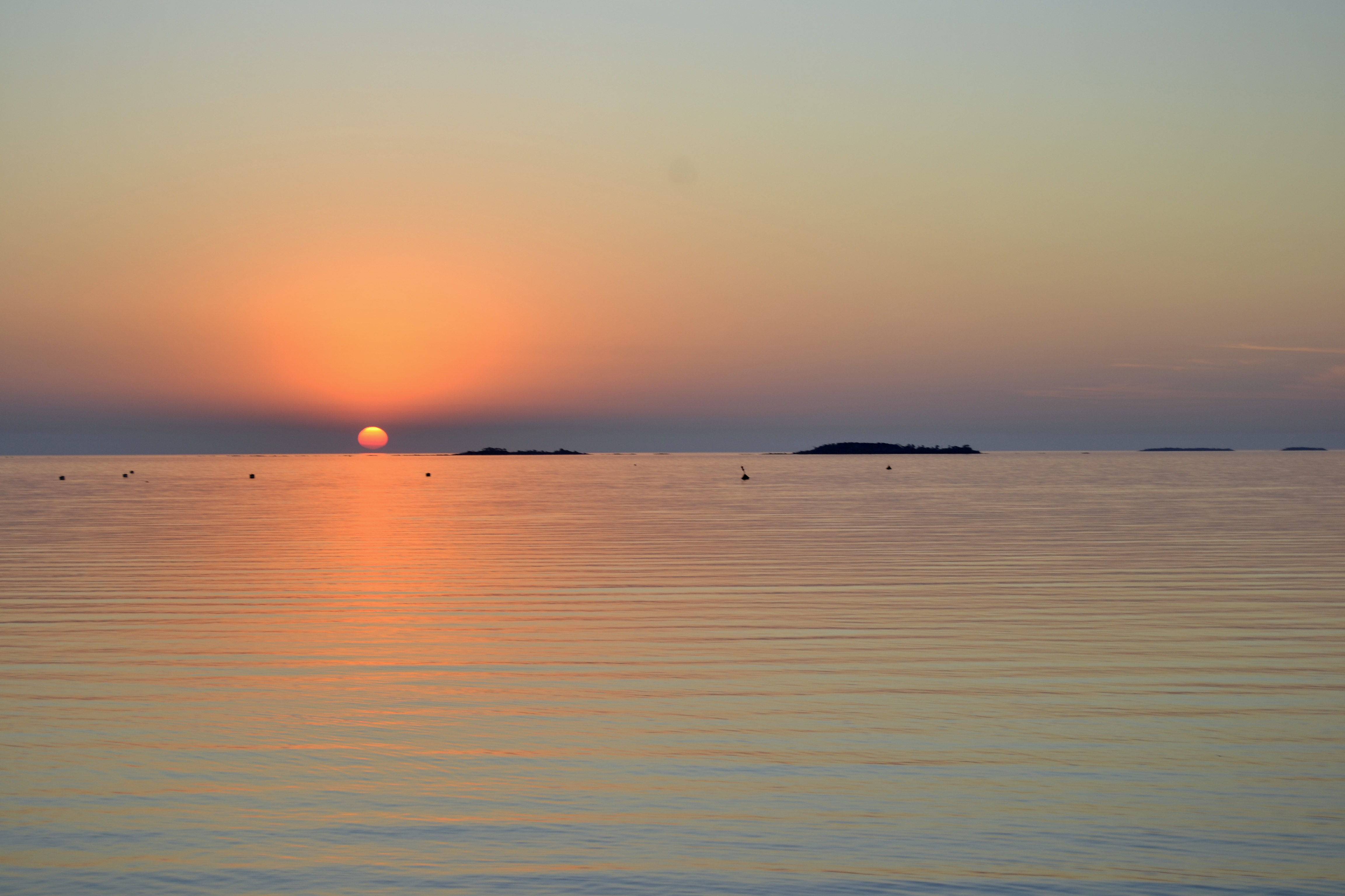 colonia del sacramento